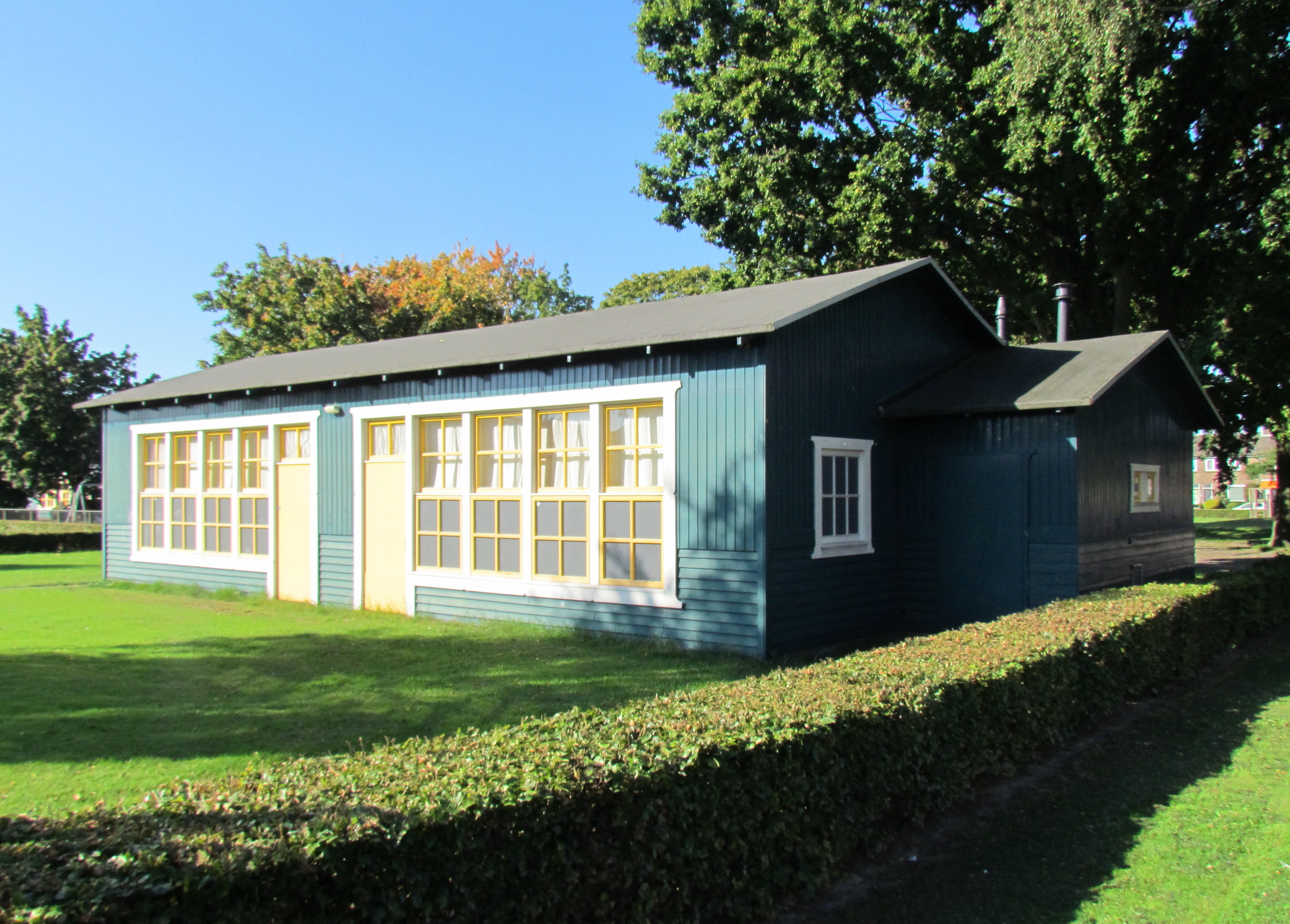 Finse school, Eksterweg 73 te Apeldoorn